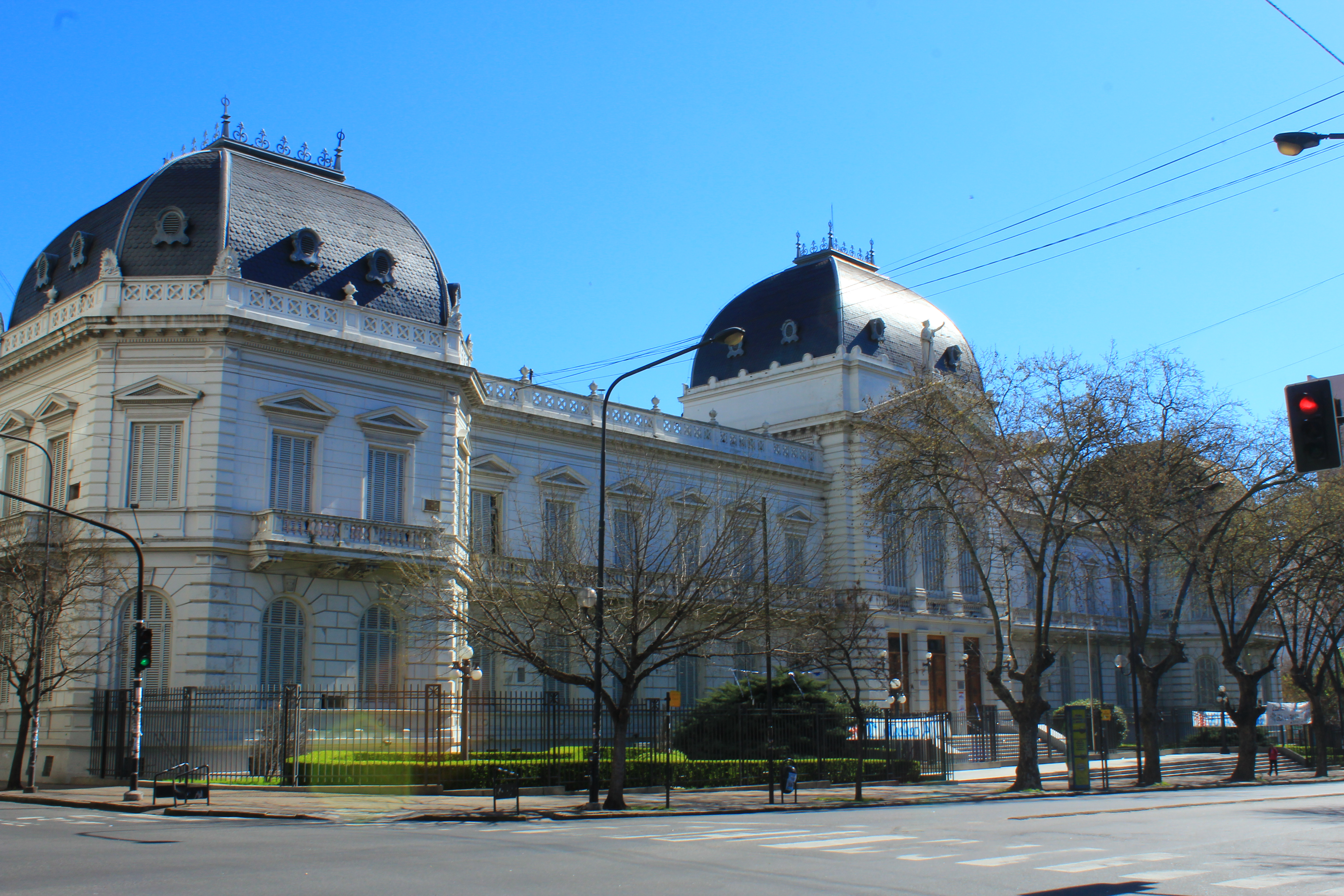 Palacio de Justicia